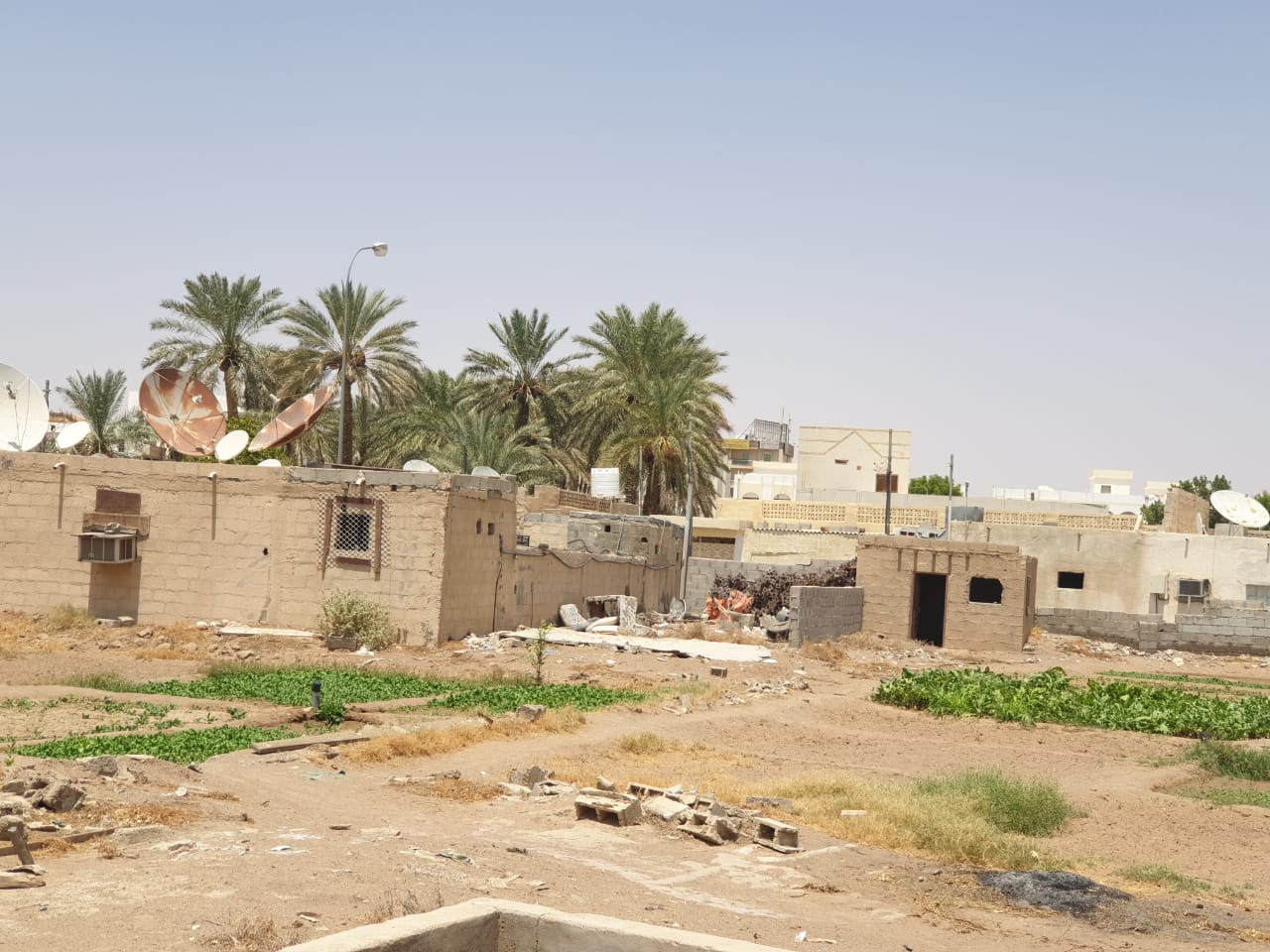 منظر من داخل إحدى مزارع صعراء القديمة المطلة على المنازل